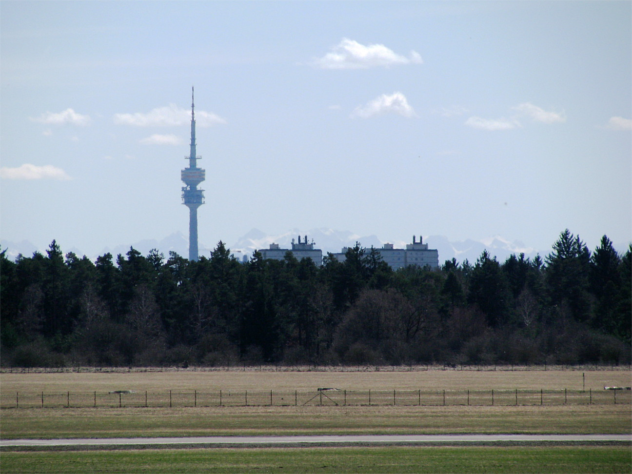 Flugplatz Oberschleißheim im Vordergrund, dahinter das Korbinianiholz, Bestandteil des LSG „Münchner Norden im Bereich der Gemeinde Garching bei München, Ober- und Unterschleißheim“; im Hintergrund der Münchner Olympiaturm